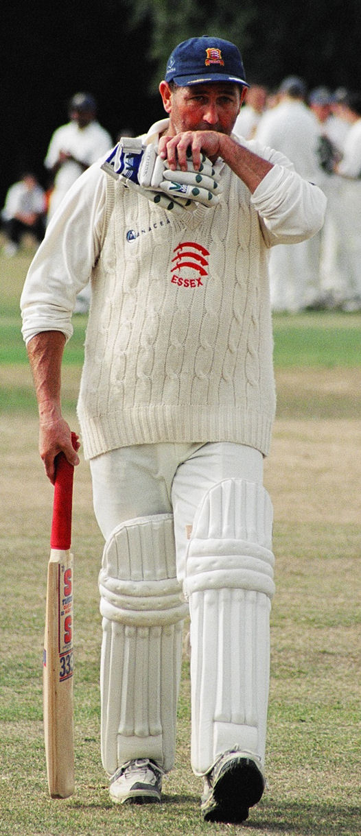 Graham Gooch at ECCBA Benefit Match, Upminster